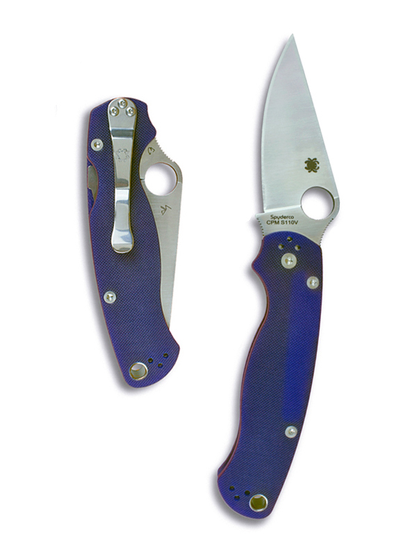 Spyderco Paramilitary 2